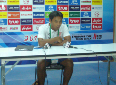 Tawan Sripan